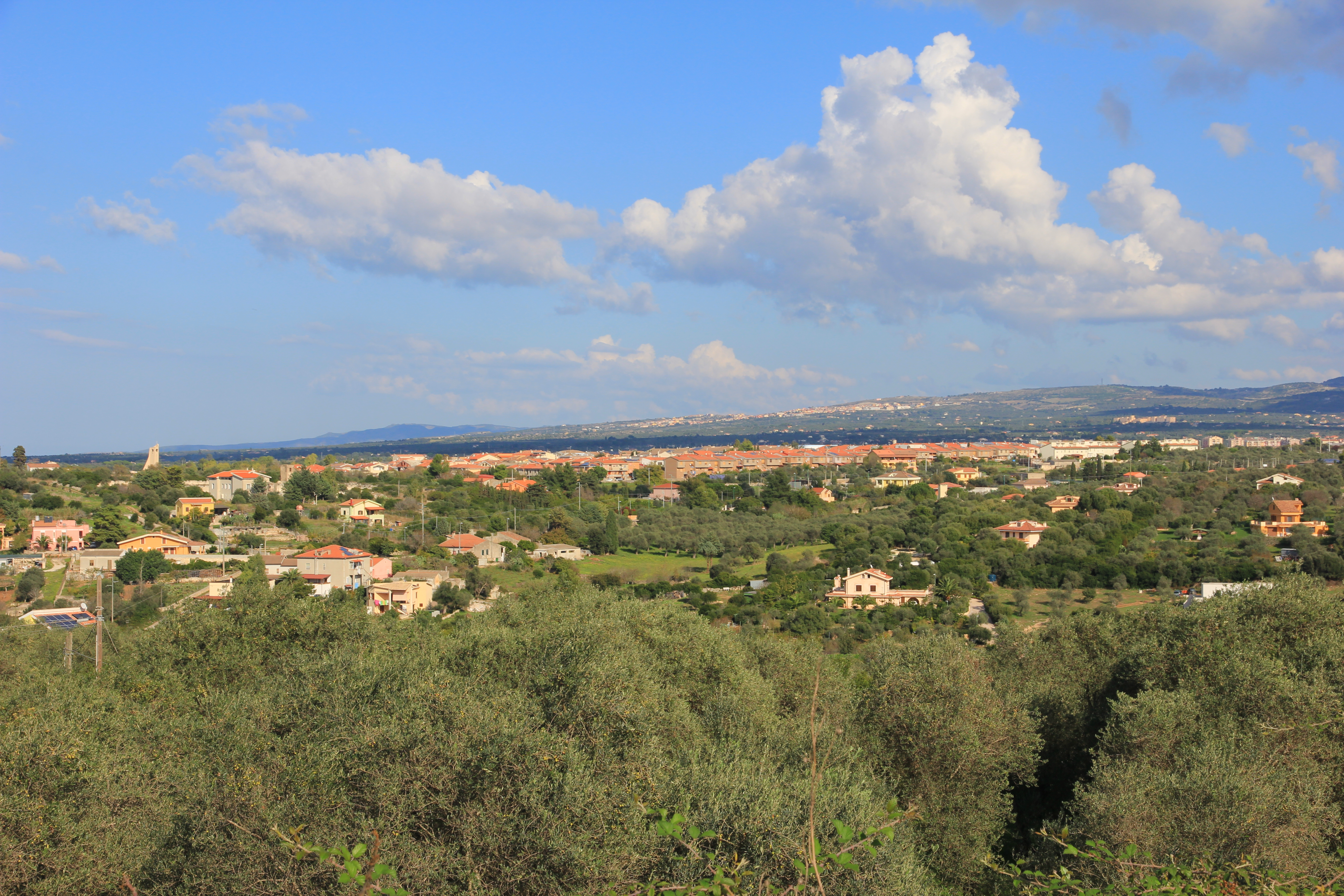 Sassari